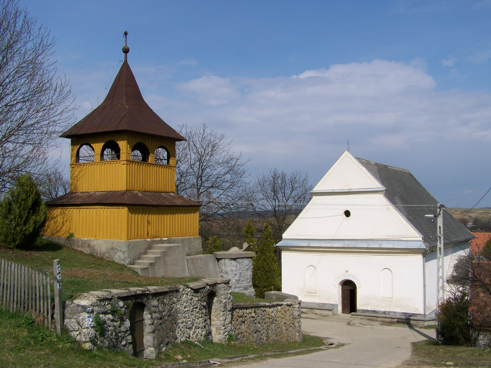 Református templom (Mályinka, Dózsa Gy. u.) This is a photo of a monument in Hungary. Identifier: 2888